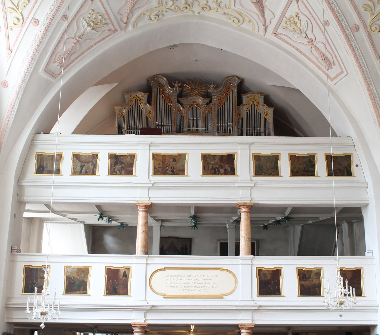 Orgel von St. Laurentius in Rottach-Egern (1996, A. Staller, III/28)